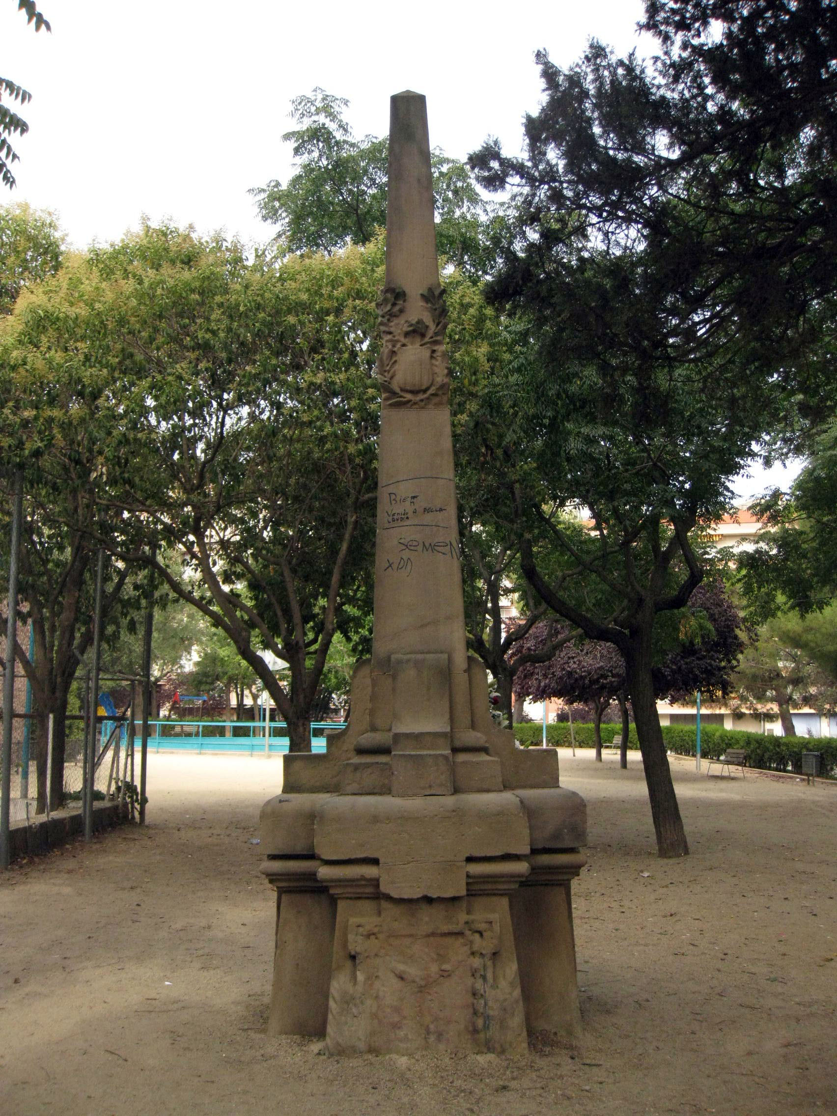 Monument a Jover i Alagorda, pertanyent a l'antic Cementiri Vell, pl. Joan Miró (Terrassa)